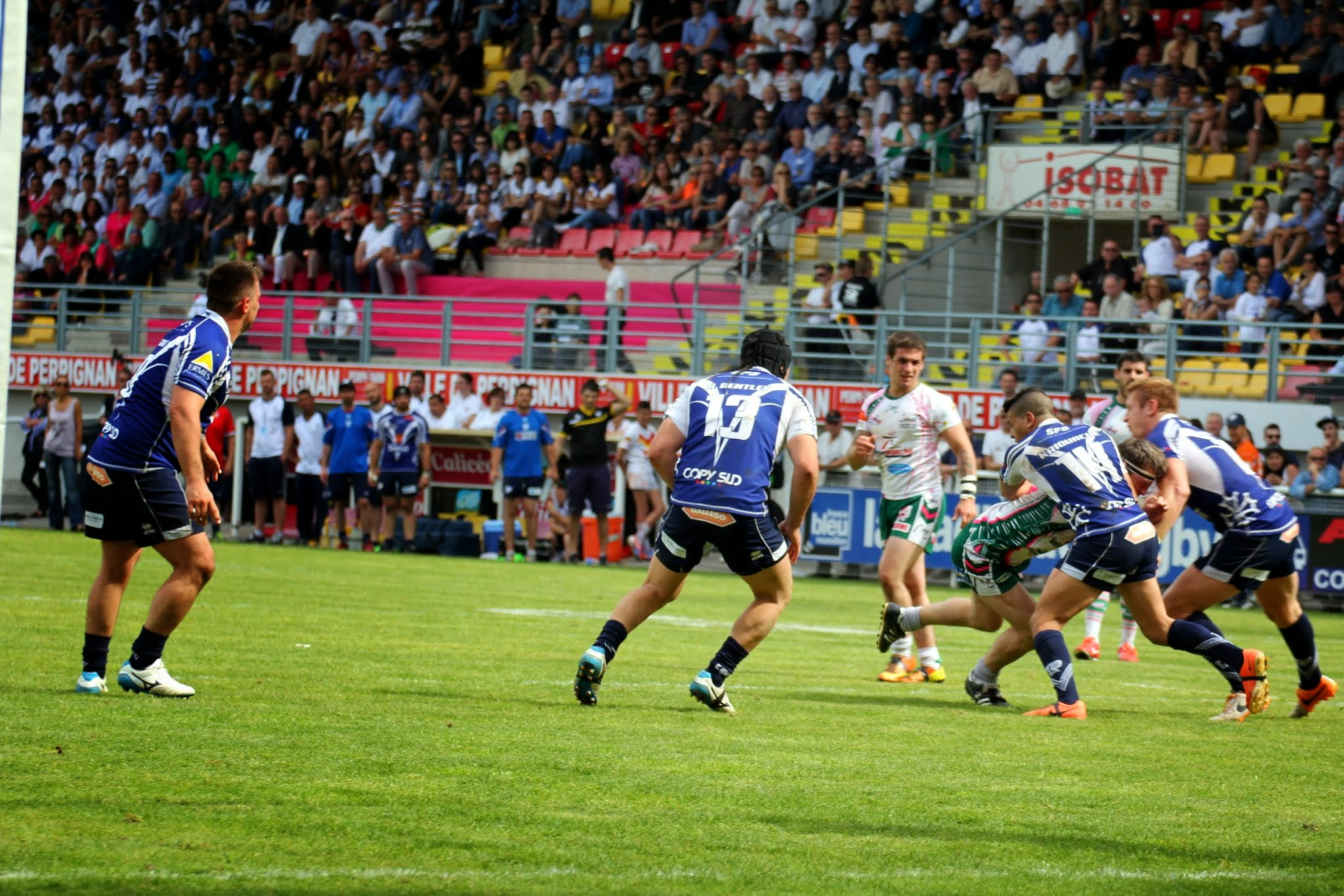 Finale du Championnat de France de rugby à XIII 2014 entre Toulouse et Lézignan